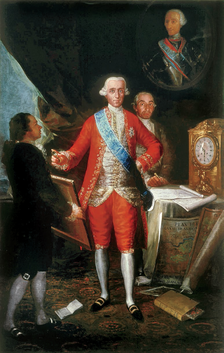 Retrato de José Moñino y Redondo (1728-1808), politico español y primer conde de Floridablanca.